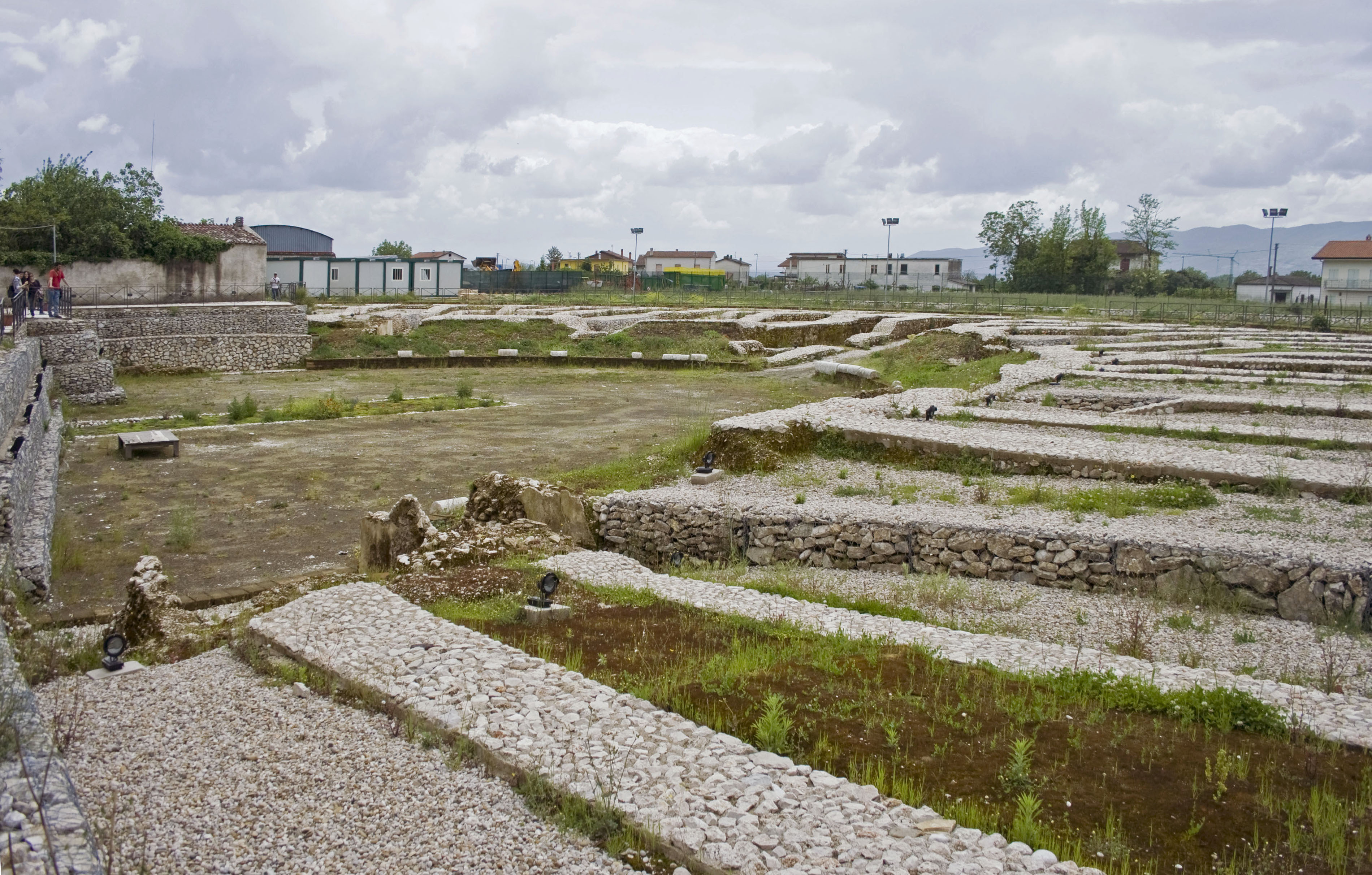 Anfiteatro dell'antica Alifae - MIBAC This is a photo of a monument which is part of cultural heritage of Italy.